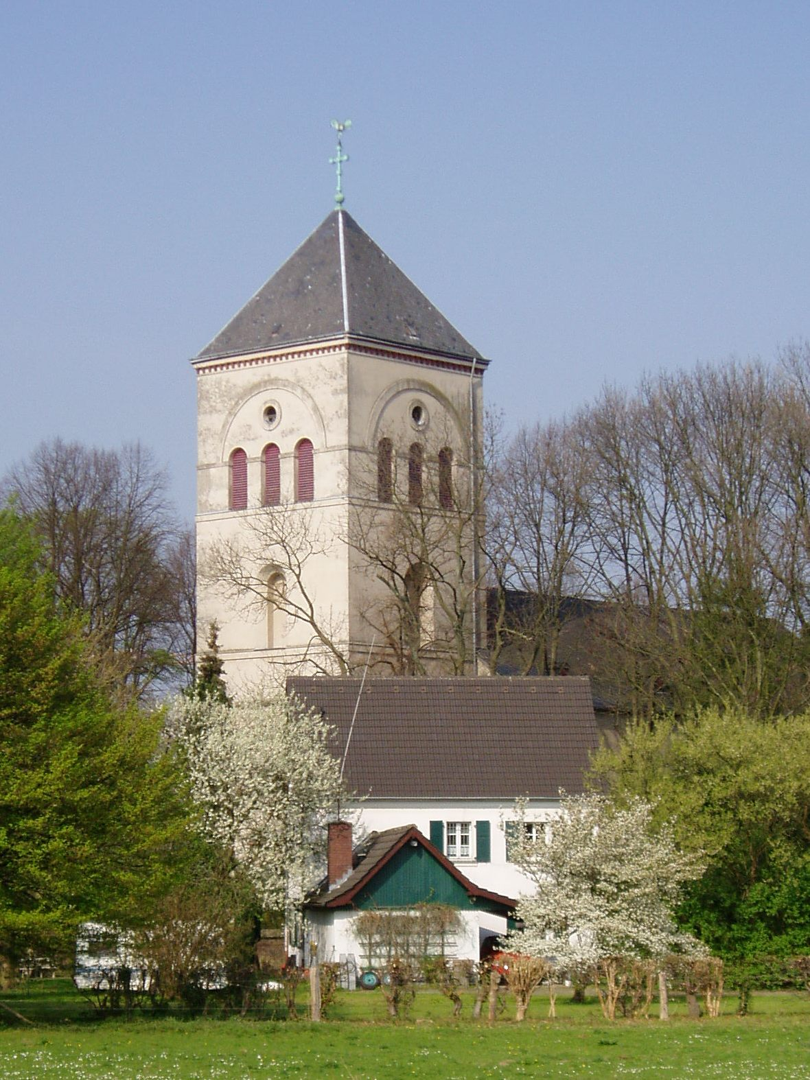 Köln-Merheim - Pfarrkirche St. Gereon